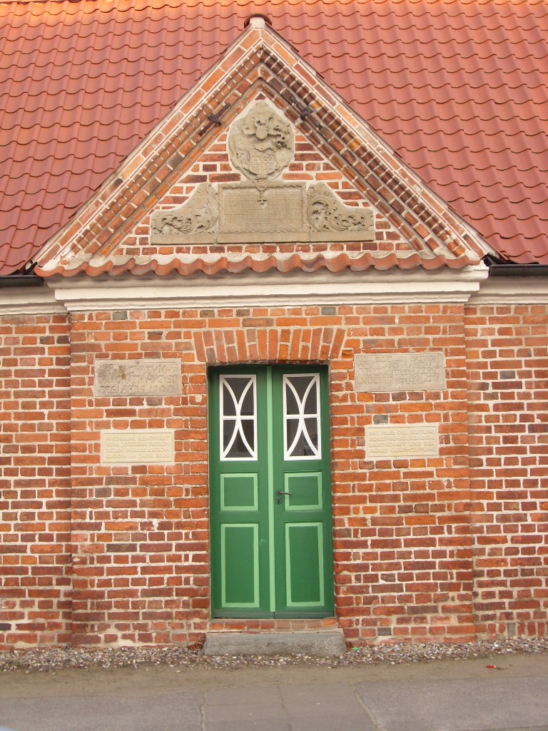 Wappen der Familie von Bülow und Gedenktafeln an Patronatsherren an einem Nebengebäude von St. Marien in Gudow, Krs. Herzogtum Lauenburg